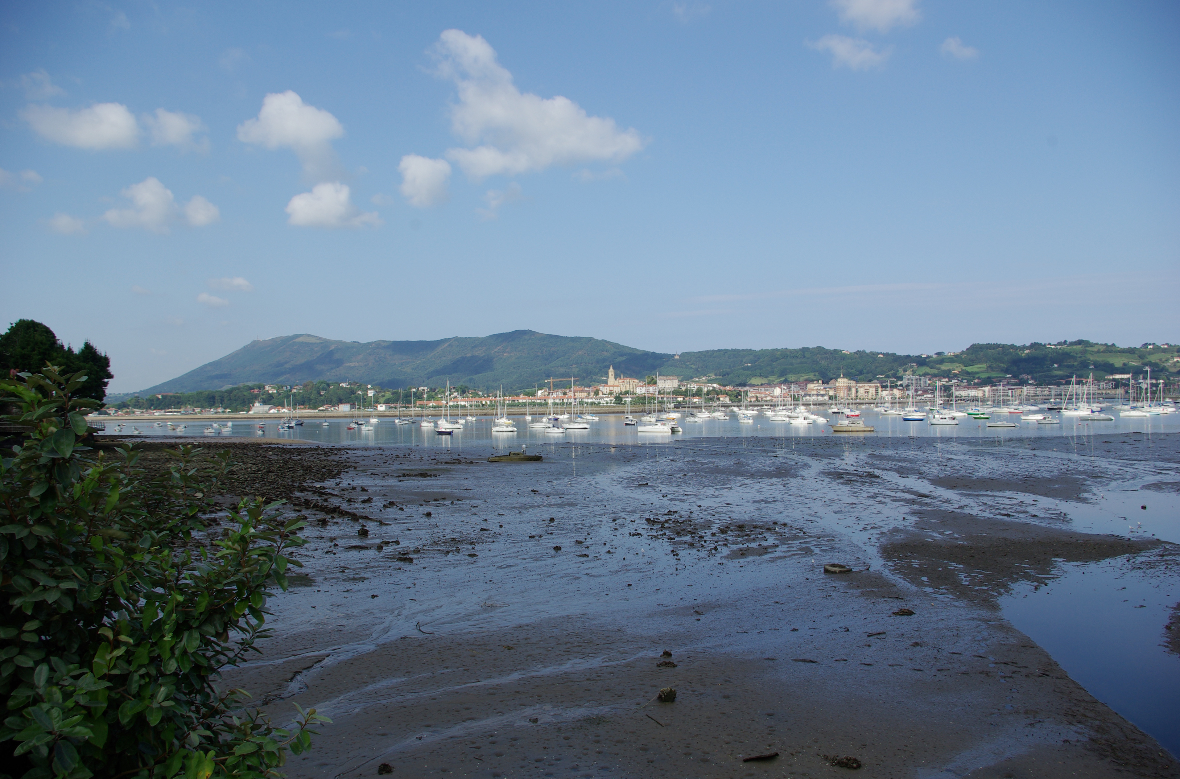 Hondarribiko ikuspegia. Gipuzkoa, Euskal Herria. A view of Hondarribia. Guipuscoa, Basque Country.